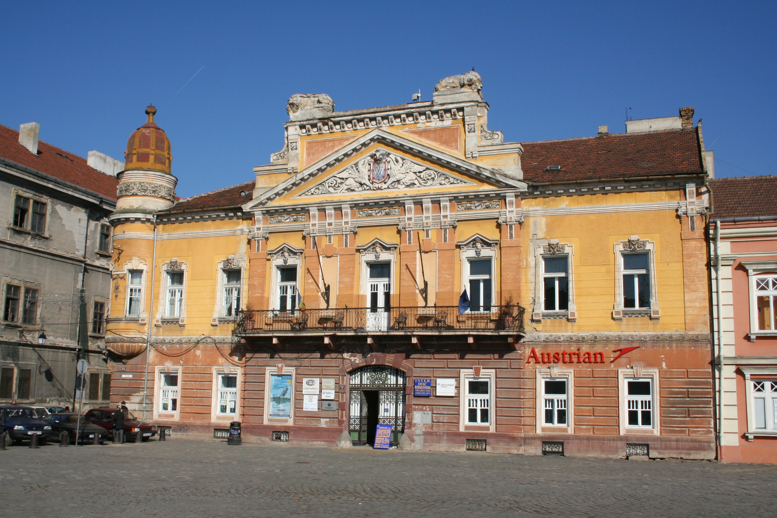 Casa cu Lei, pe latura de nord a Pieţei Unirii din Timişoara.